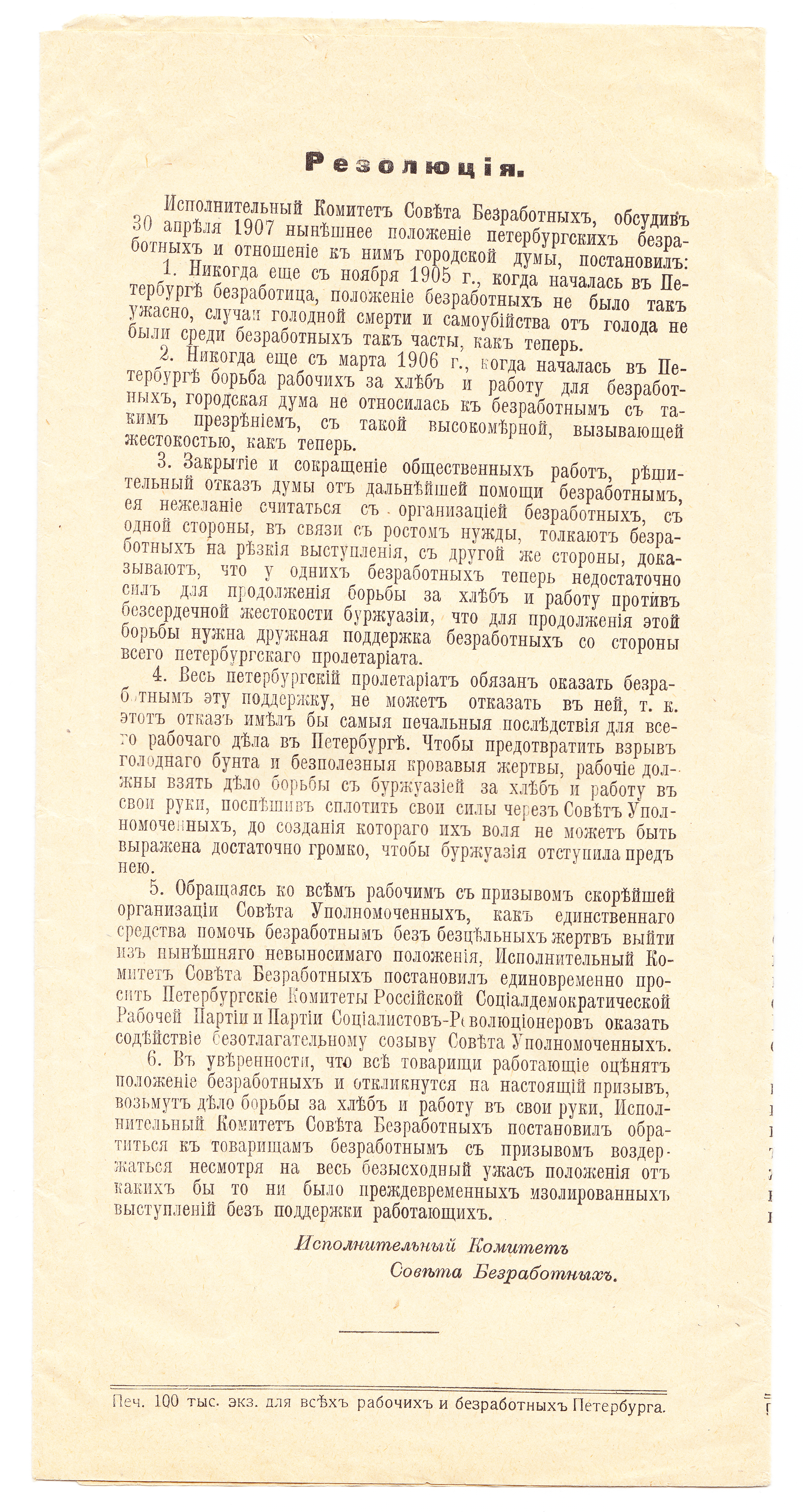 Резолюция Исполнительного Комитета Совета Безработных